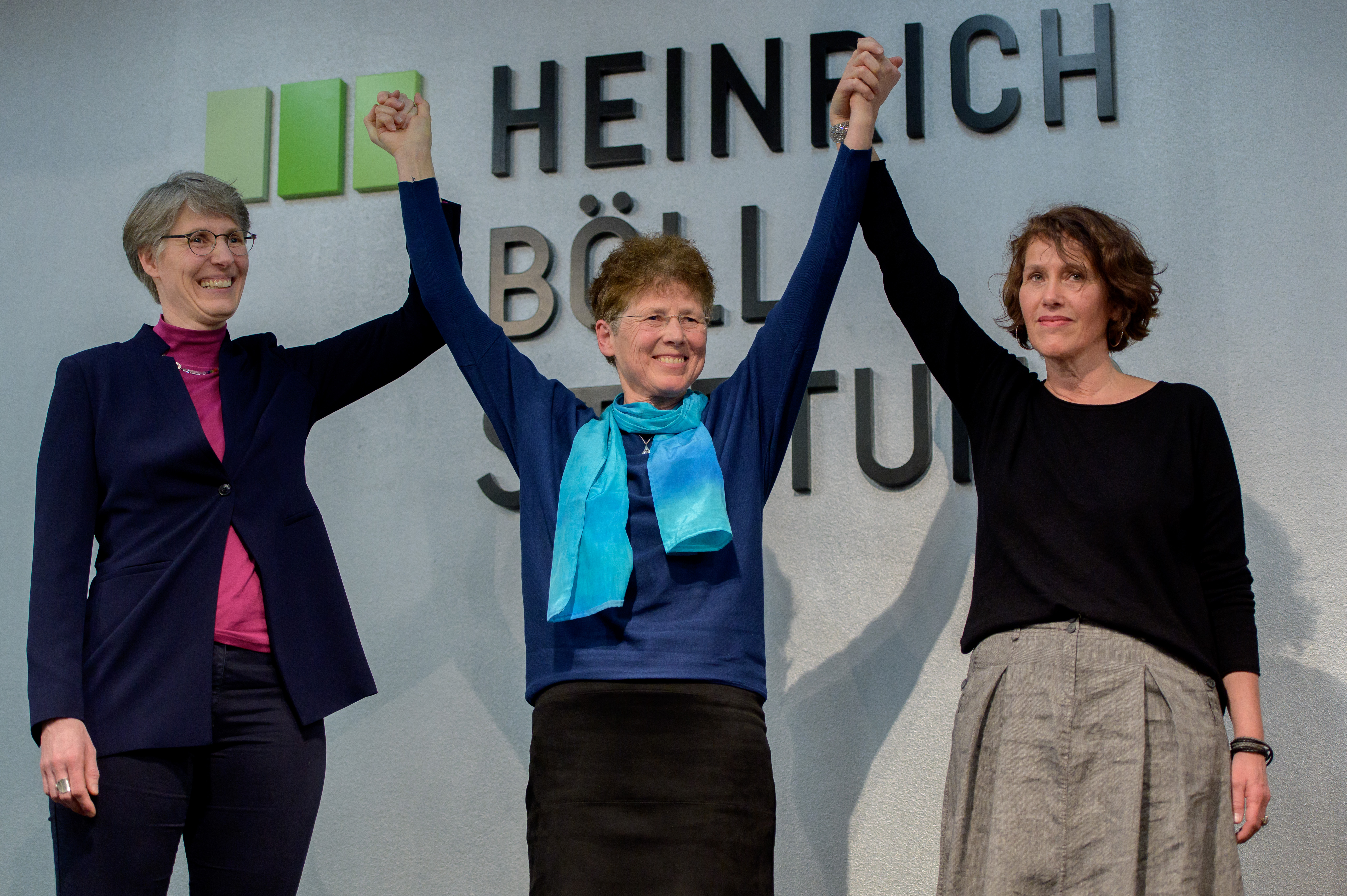 Die Preisträgerinnen des Anne-Klein-Frauenpreis 2019: Natascha Nicklaus, Kristina Hänel, Nora Szász(Ärztinnen) Foto: Stephan Röhl